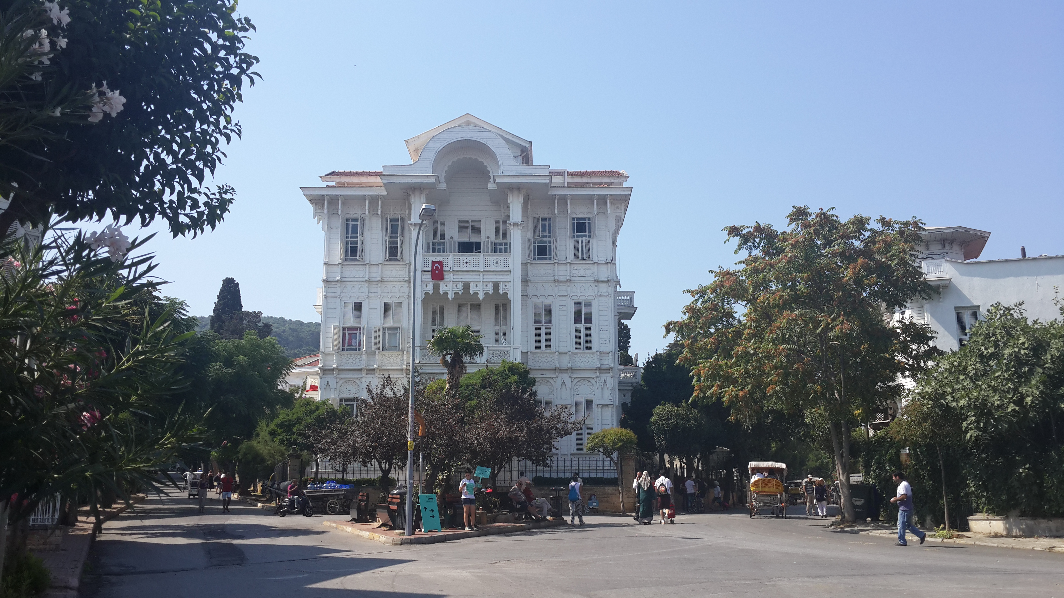 BÜYÜKADA